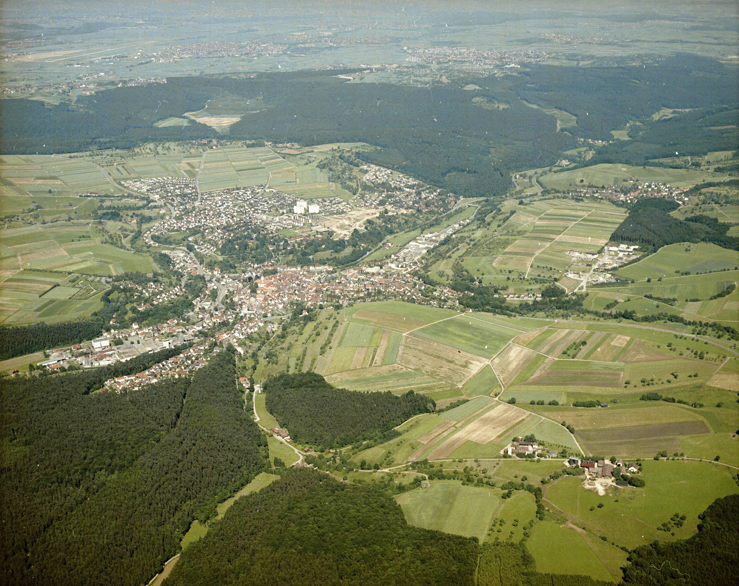 Luftbild von Waldenbuch - Staatsarchiv Sigmaringen - Archivalieneinheit N 1/96 T 1 Nr. 506